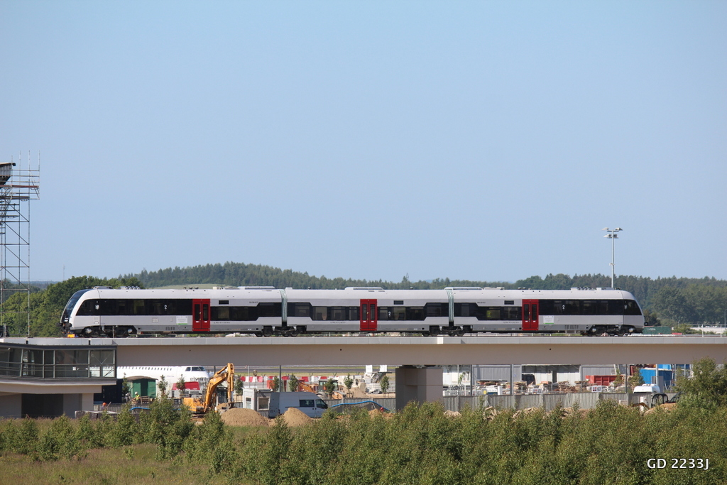 SA136-013 na estakadzie przy gdańskim porcie lotniczym.